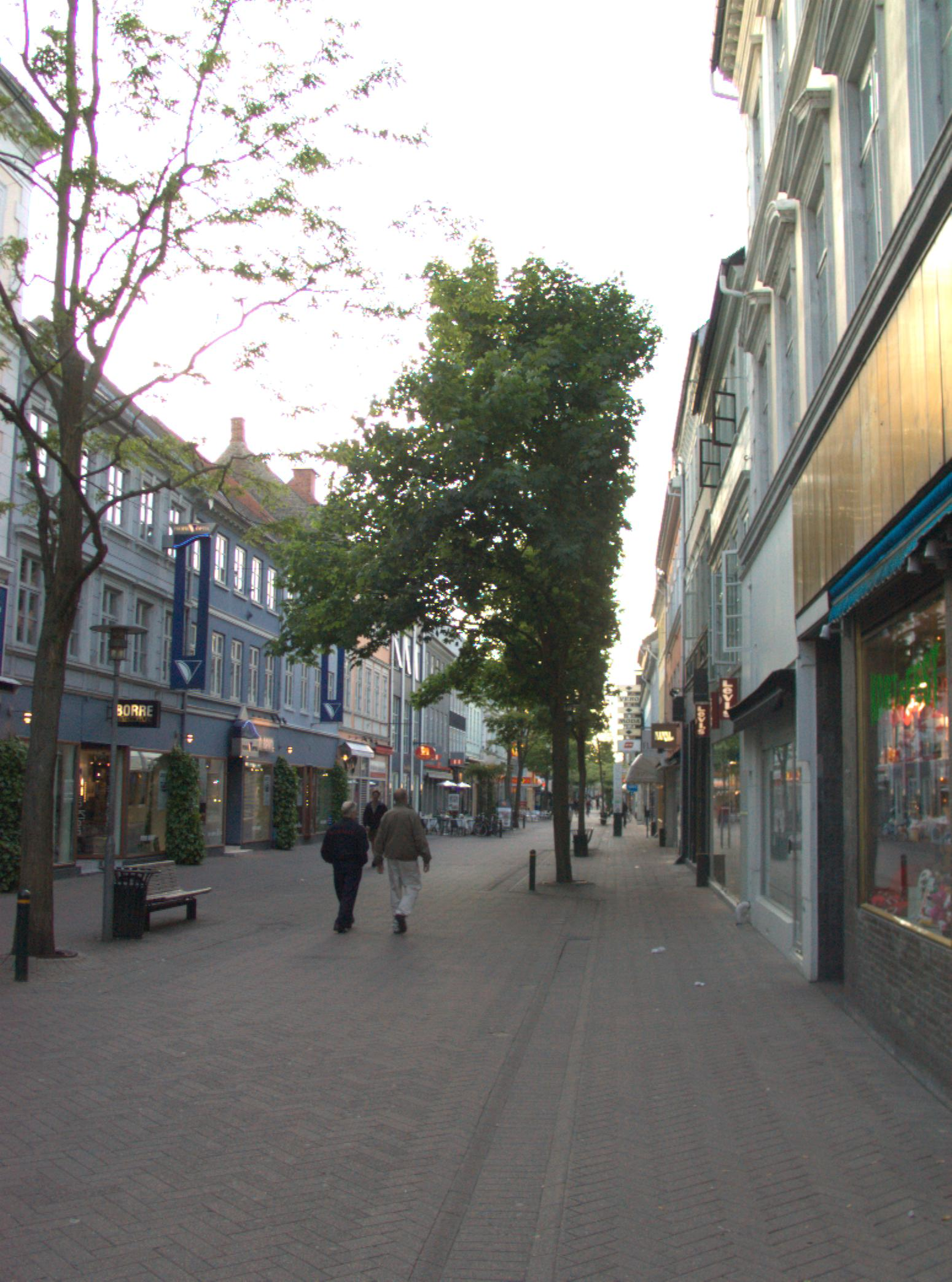 A pedestrian street (Kongensgade) in Odense, Denmark.